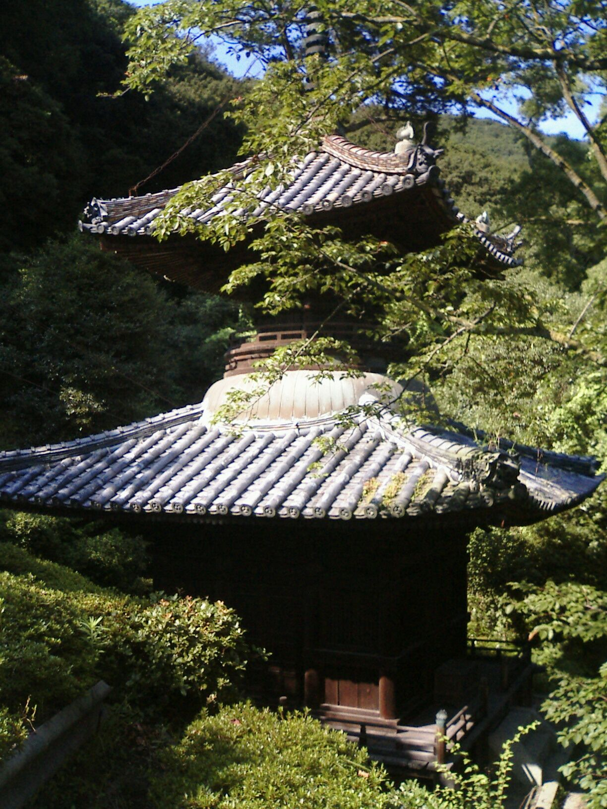 弥谷寺多宝塔 - 日本国香川県三豊市